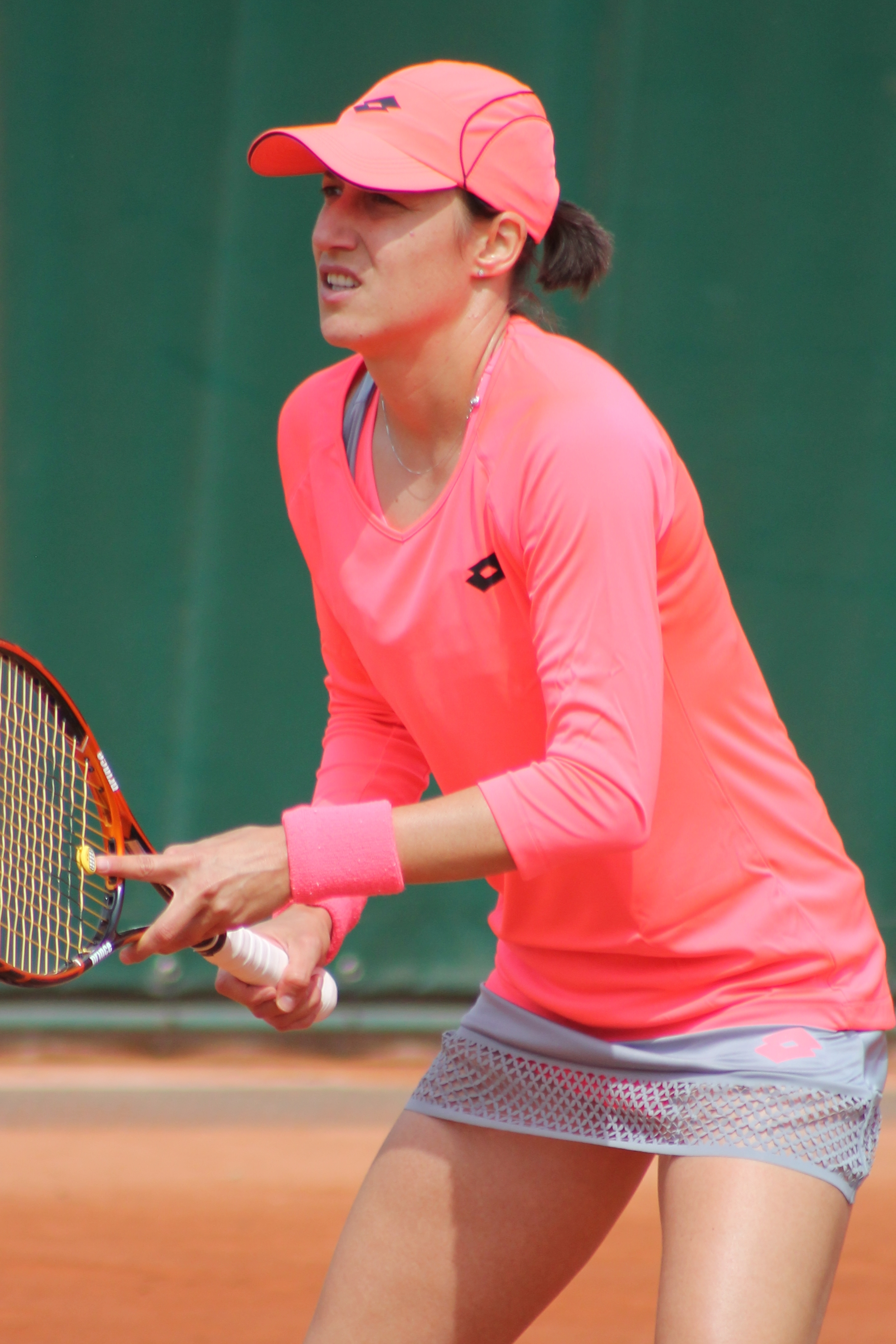 Srebotnik RG15 (11)